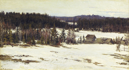 Каринская А. Н. Зима на Лумбе. Начало XX века. Холст, масло. Из собрания Вологодской областной картинной галереи